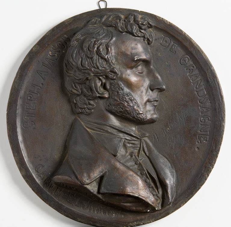 Médaillon du buste d'Ajasson de Grandsagne